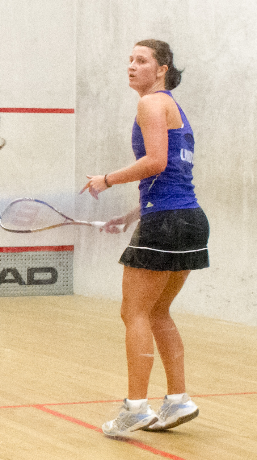 Joelle King et Kylie Lindsay